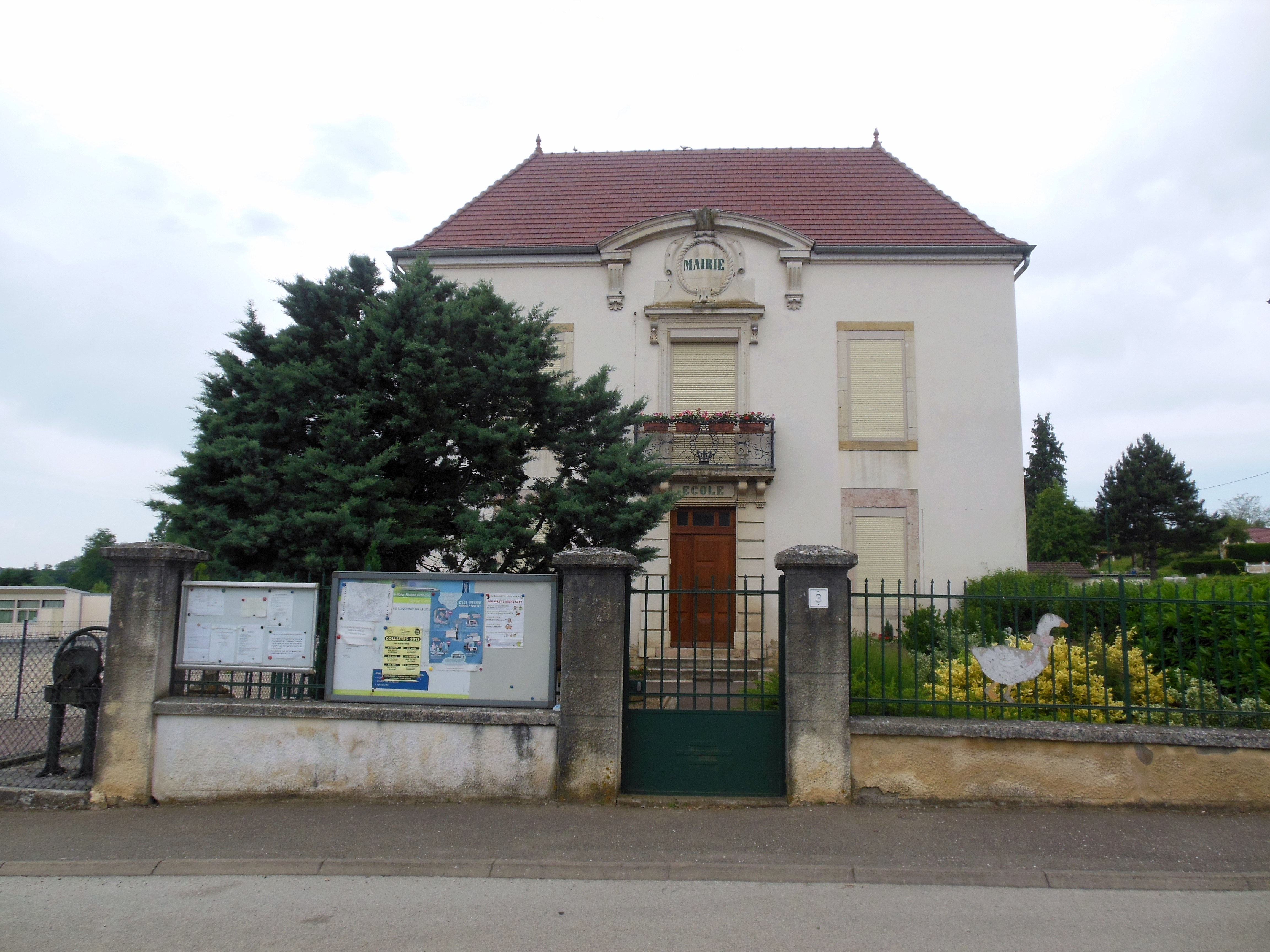 Mairie (XIXe s), jadis mairie-école, Rue Saint-Médard, à Poncey-lès-Athée (21).